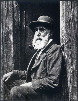 Le guide Melchior Anderegg à 68 ans